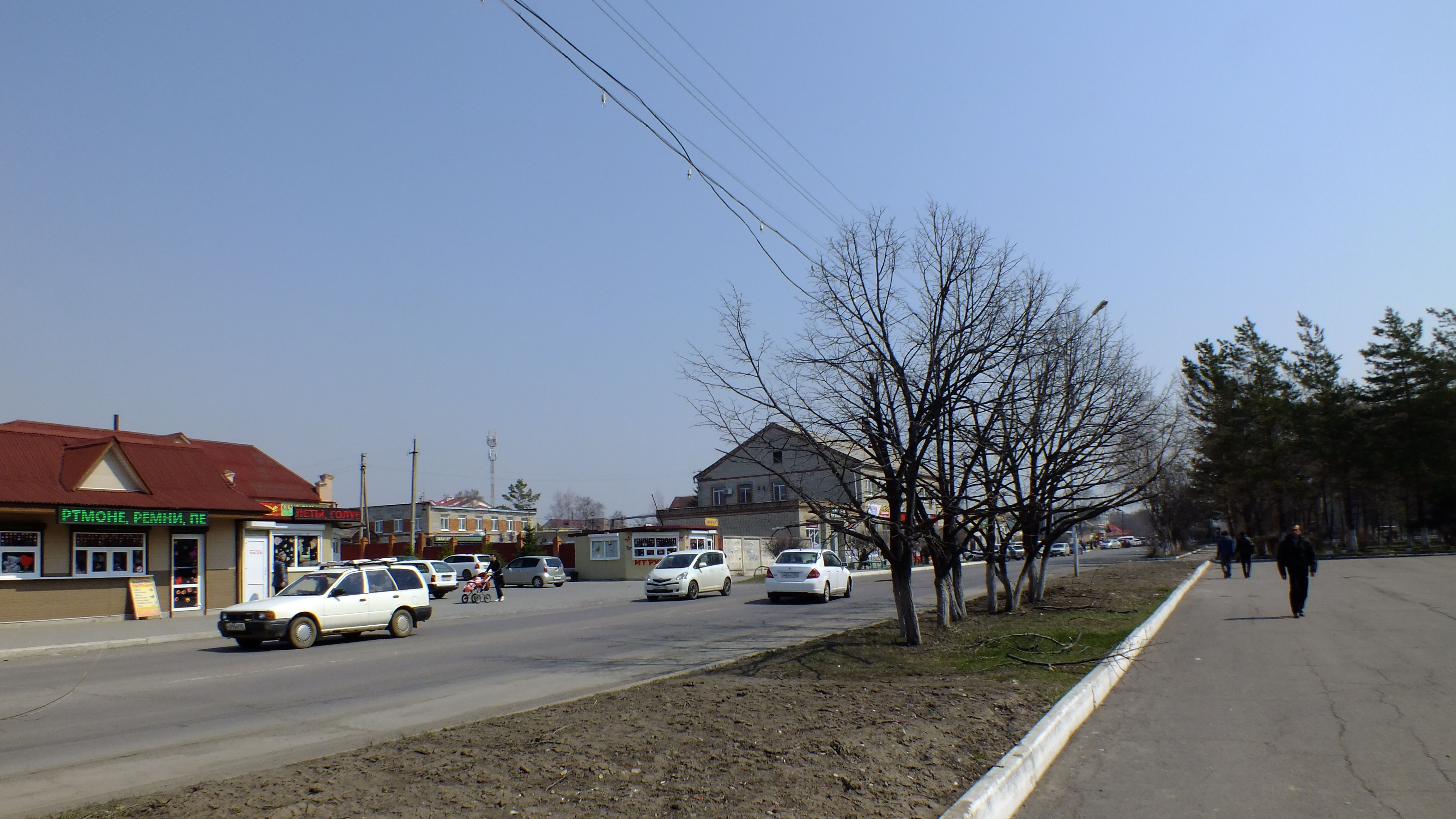 Михайловка (Михайловский район Приморского края)